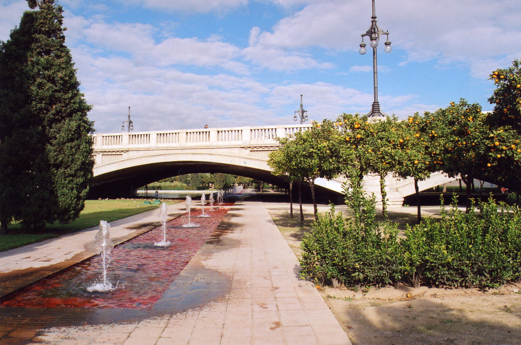 Jardines del Turia, Valencia-España